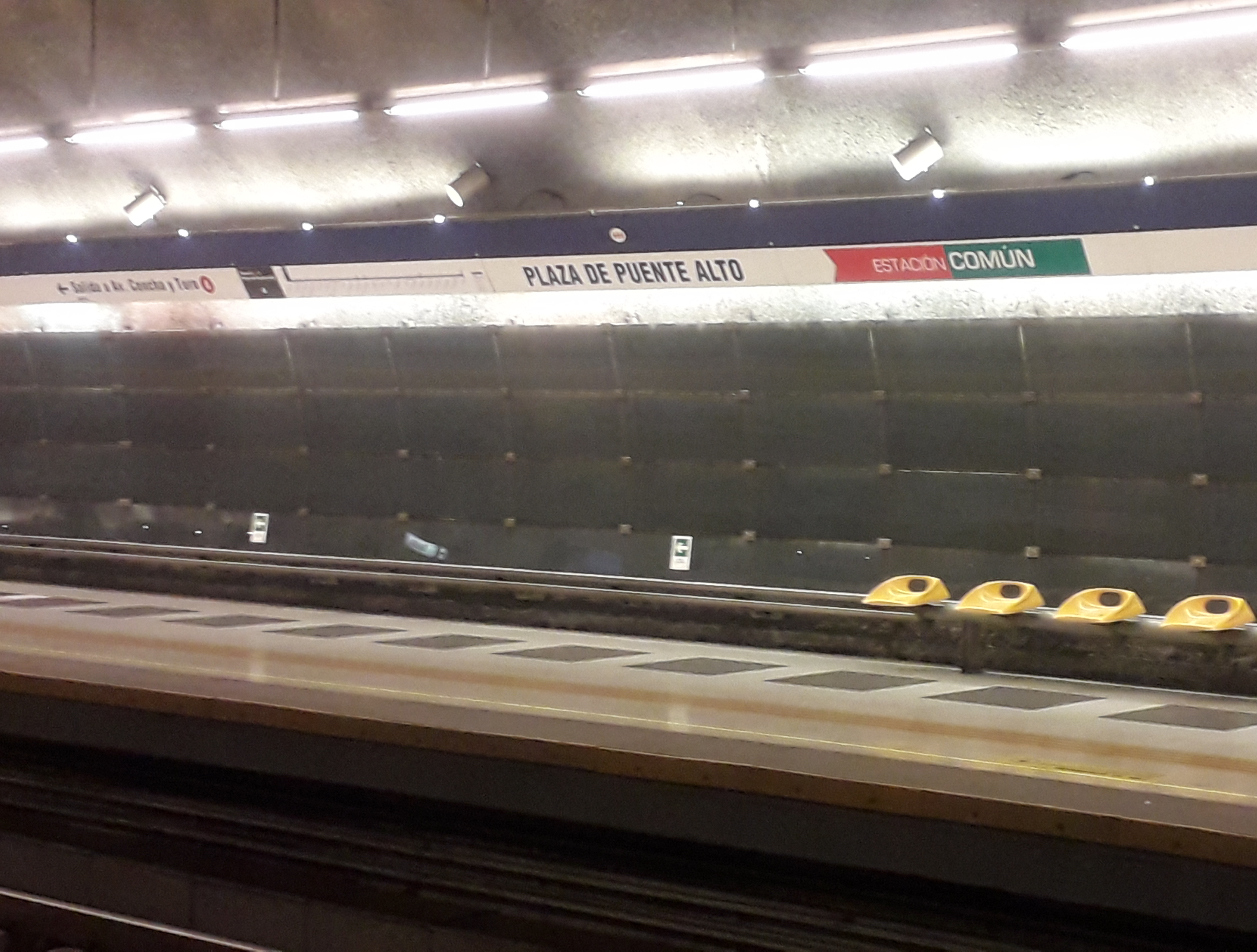 Estación Plaza de Puente Alto de la Línea 4 del Metro de Santiago.